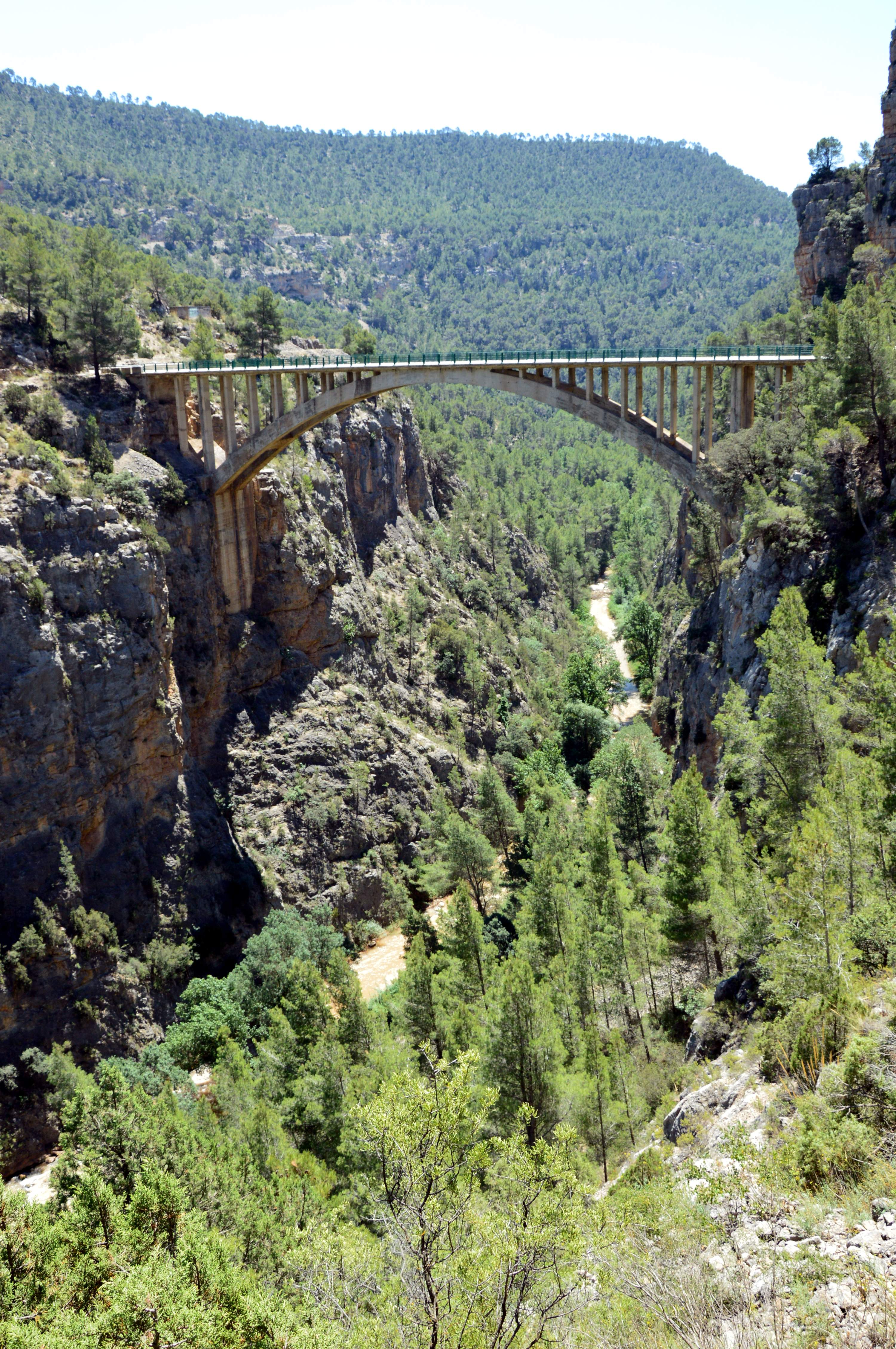 Puente de Santa Cruz de Moya (Cuenca), sobre el río Turia (2018).